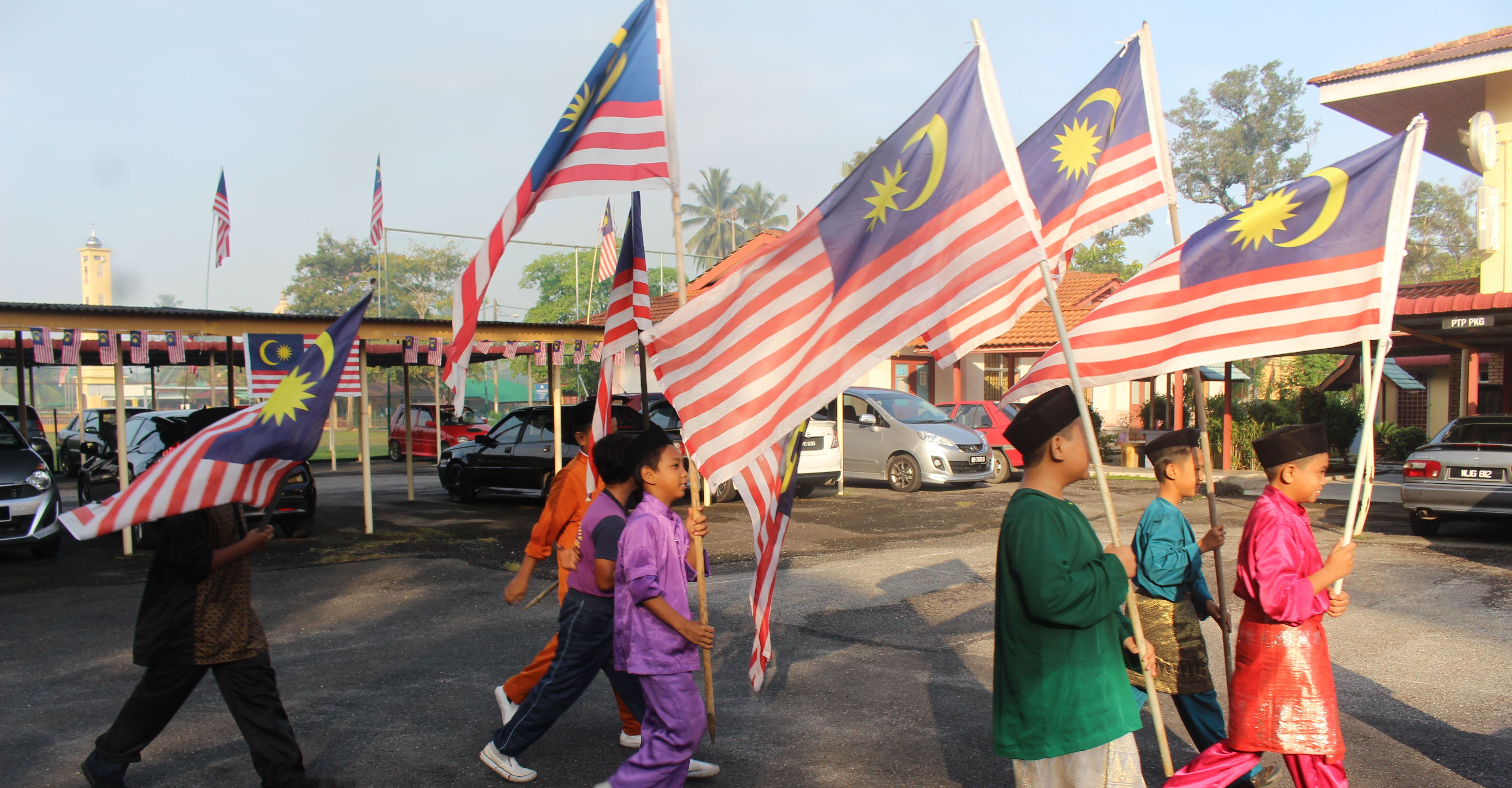 Murid-murid membawa masuk bendera Malaysia